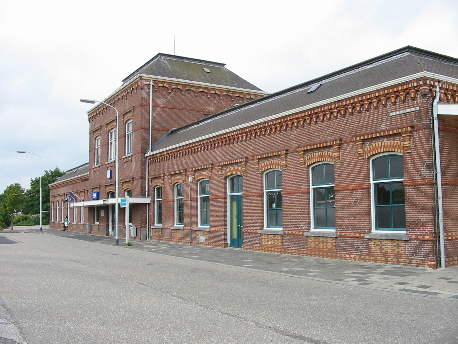 Voorzijde station Delfzijl.